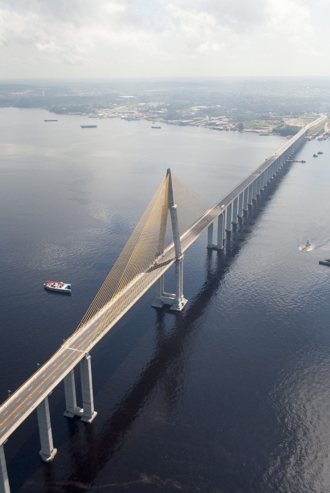 Ponte Rio Negro, Manaus - Amazonas